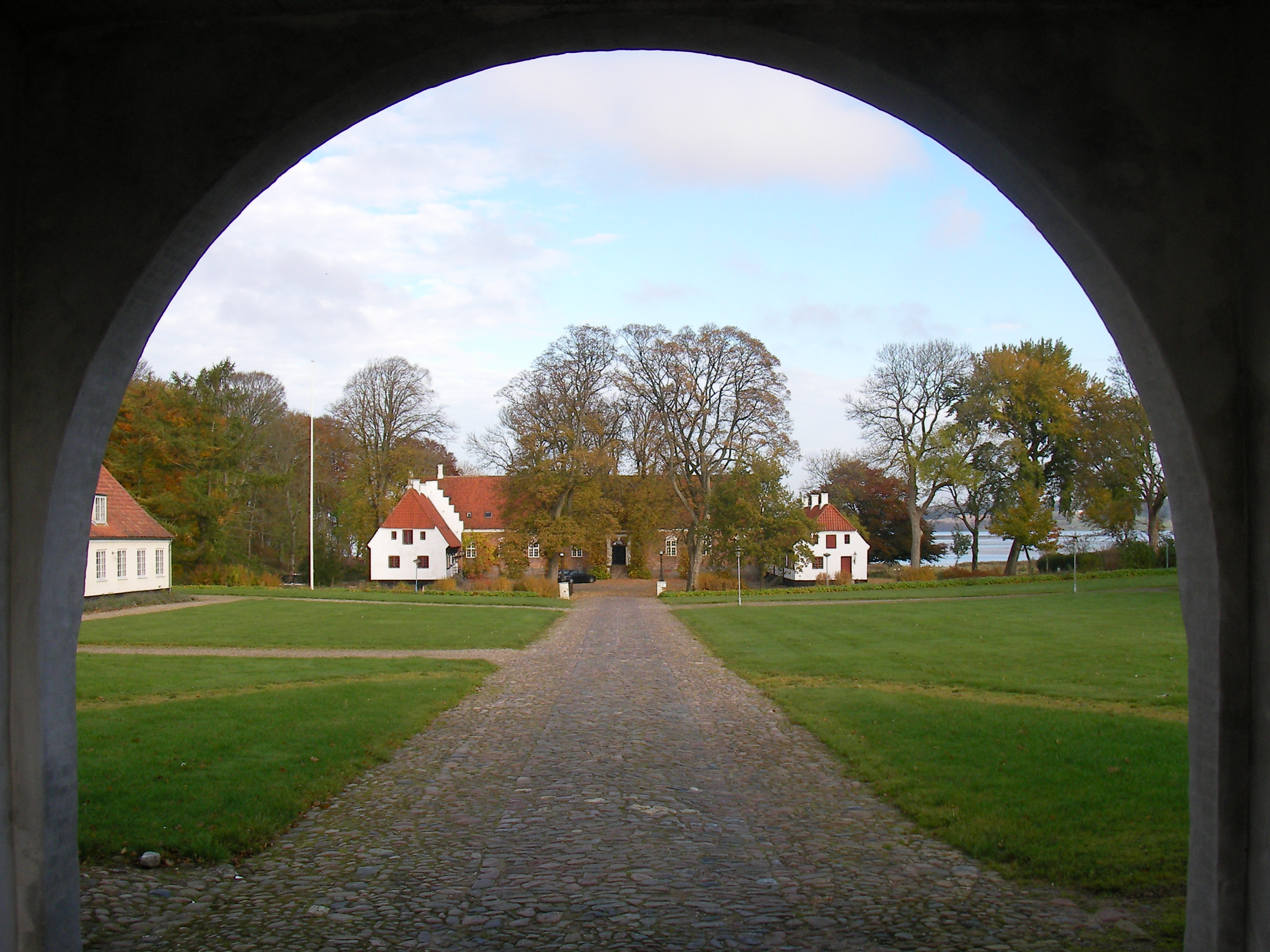 Taarupgaard set fra syd gennem vognport